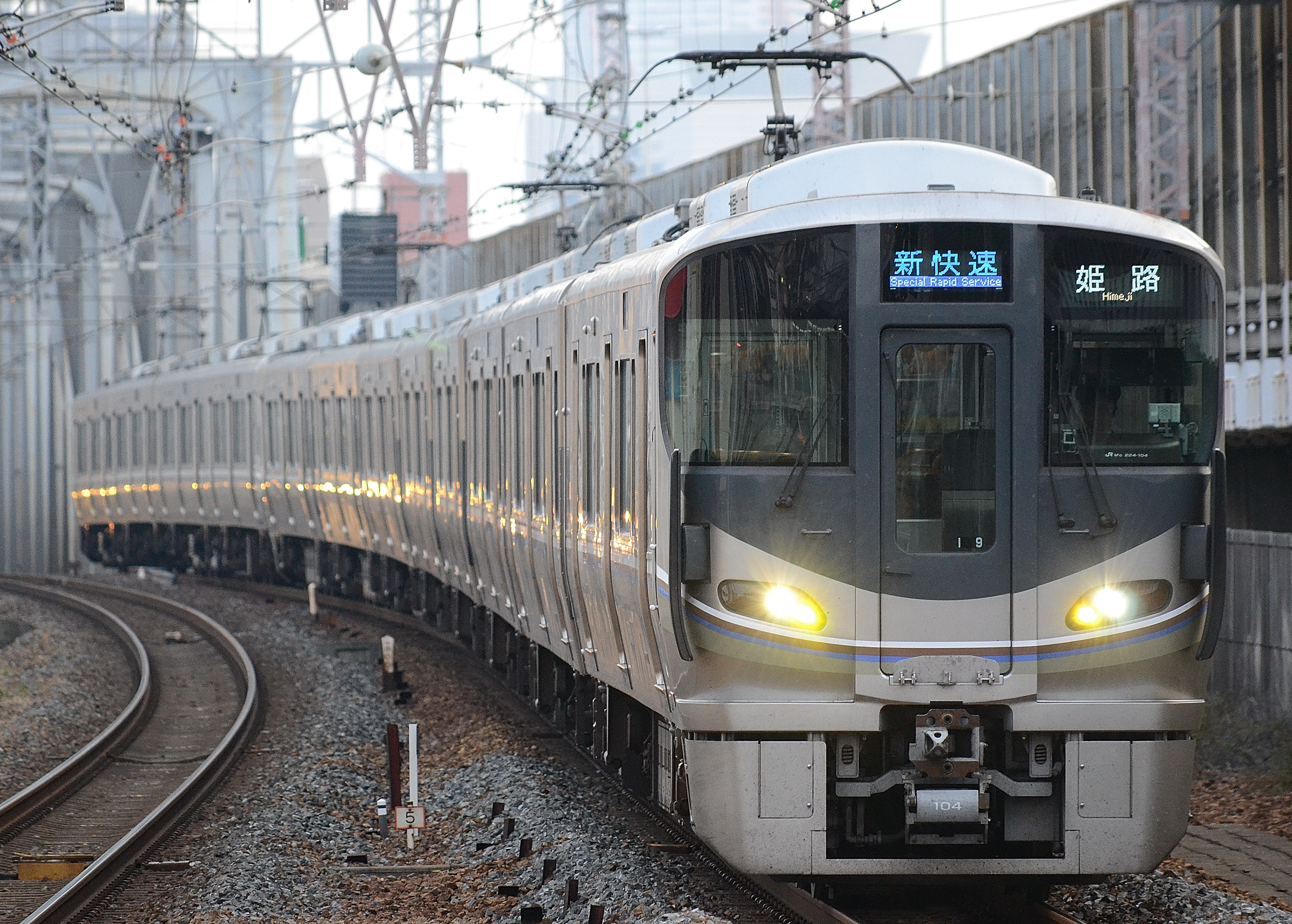 東海道本線塚本駅において下り外側線を走行する225系100番台 による新快速列車（塚本駅ホームから撮影）